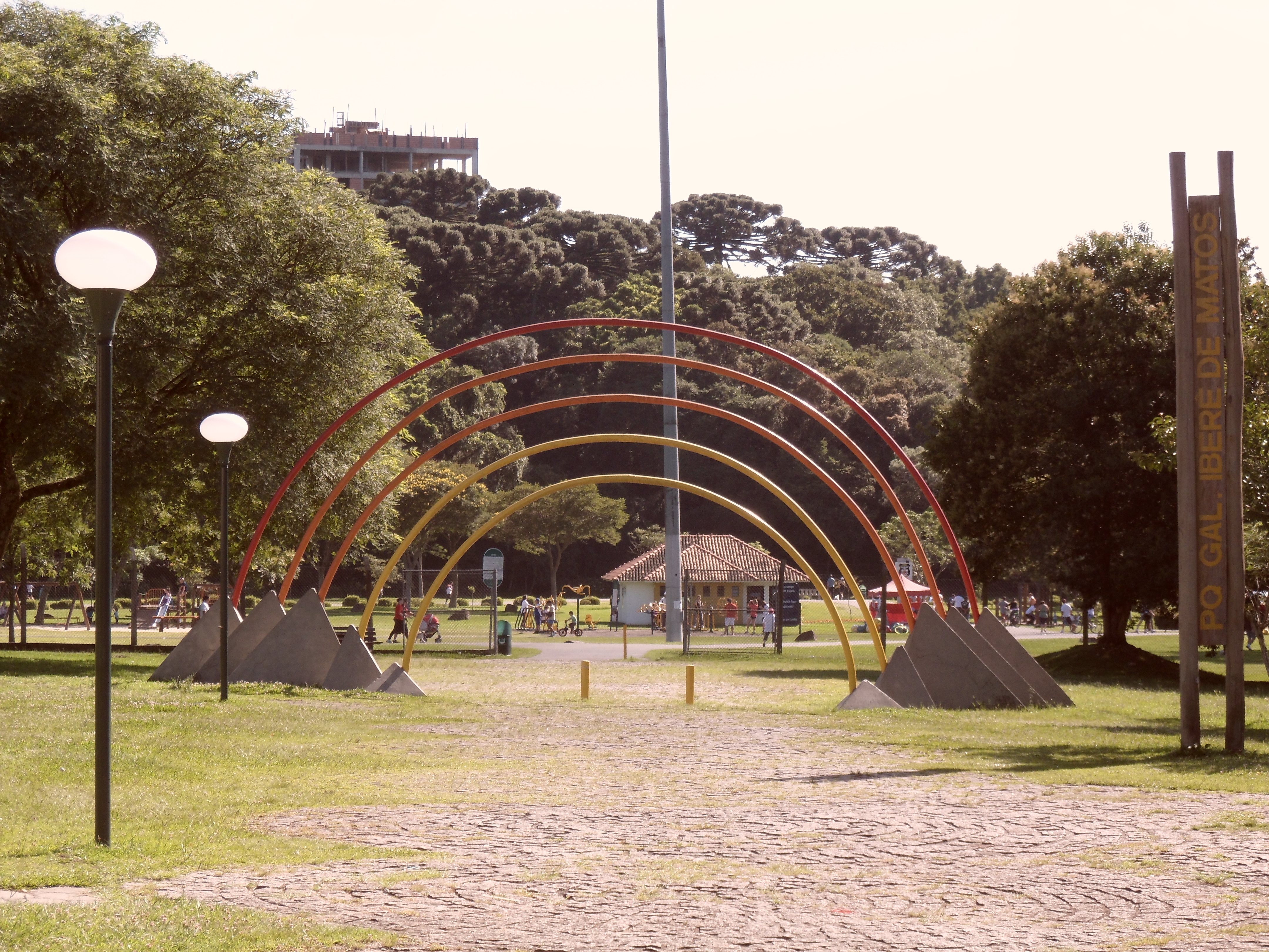 Portal do Parque General Iberê de Matos, Bacacheri, Curitiba, Paraná, Brasil.